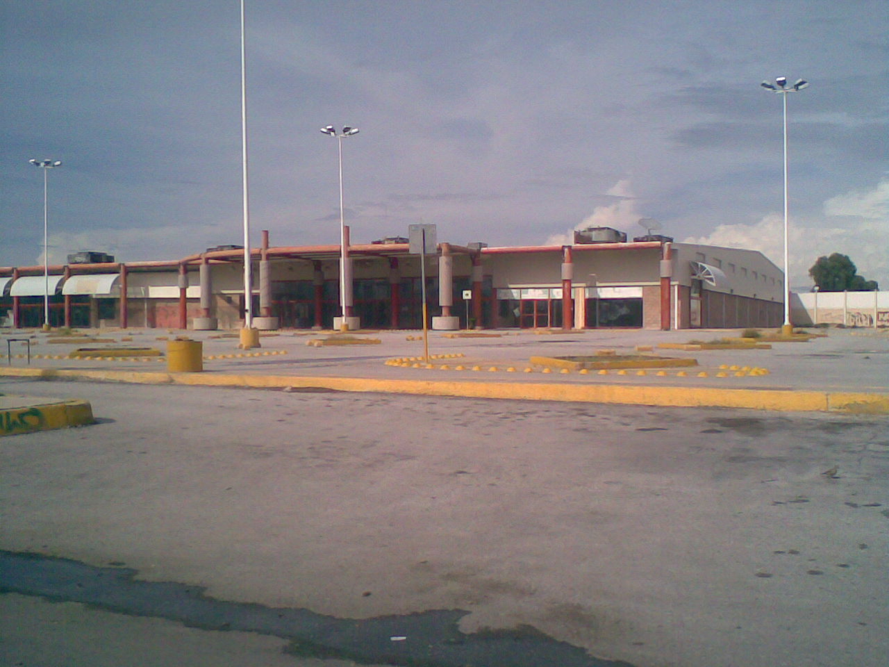 Formerly Gigante in Gómez Palacio